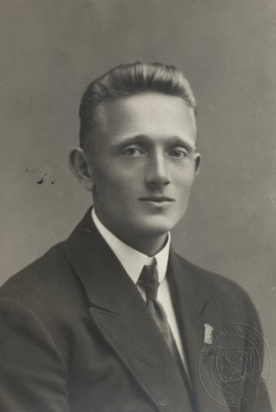 František Pecháček (1896-1944), český sokolský cvičitel